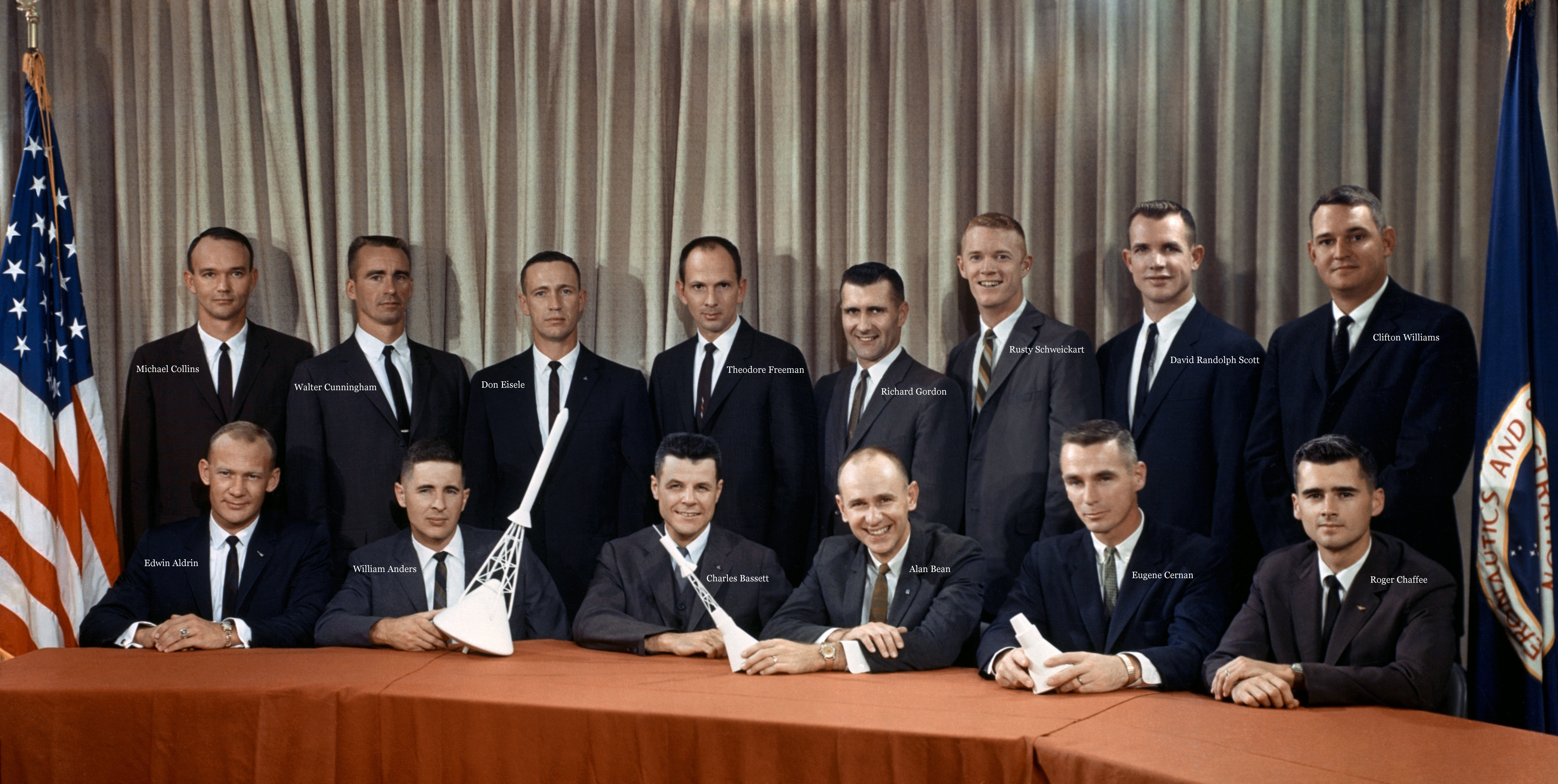 Der Name von Edwin Aldrin ist jetzt richtig geschrieben.